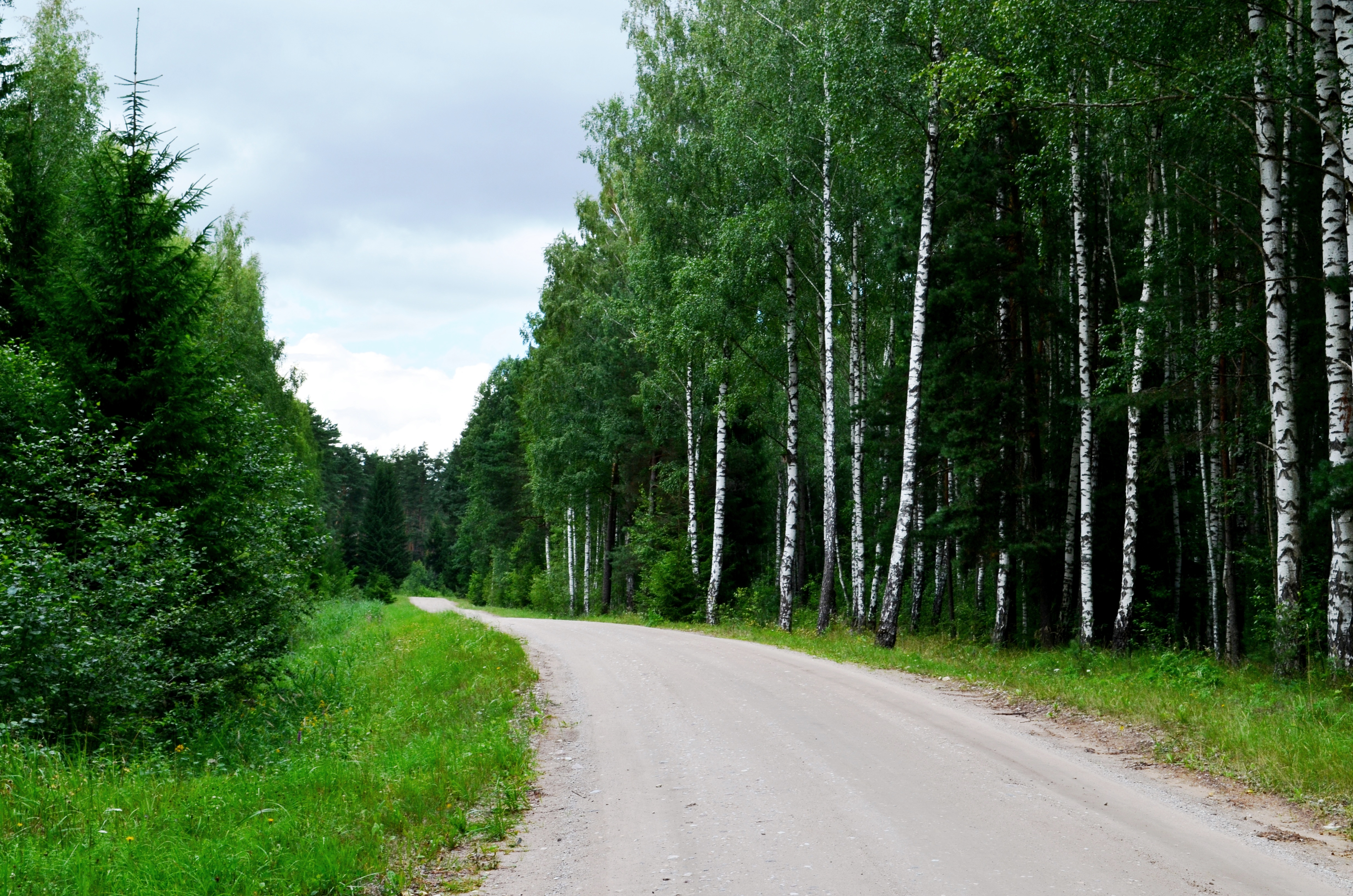 Krekenavos miškai netoli stumbryno, Panevėžio raj.